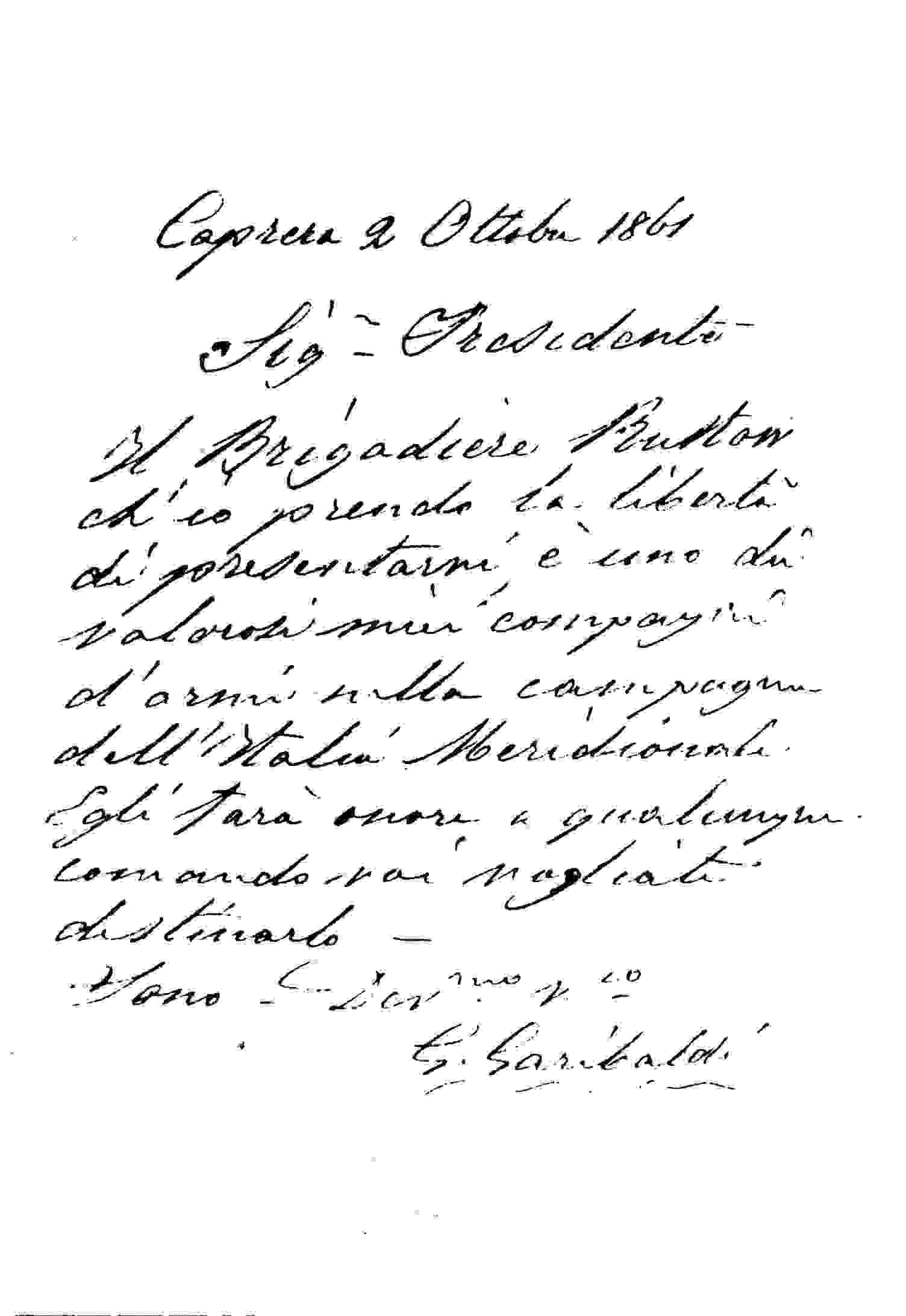 Handschriftl. Ermächtigungsschreiben Garibaldis an Wilhelm Rüstow